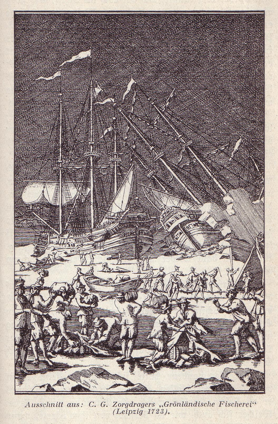 Holzstich vom niederländischen Walfang im Packeis vor Grönland